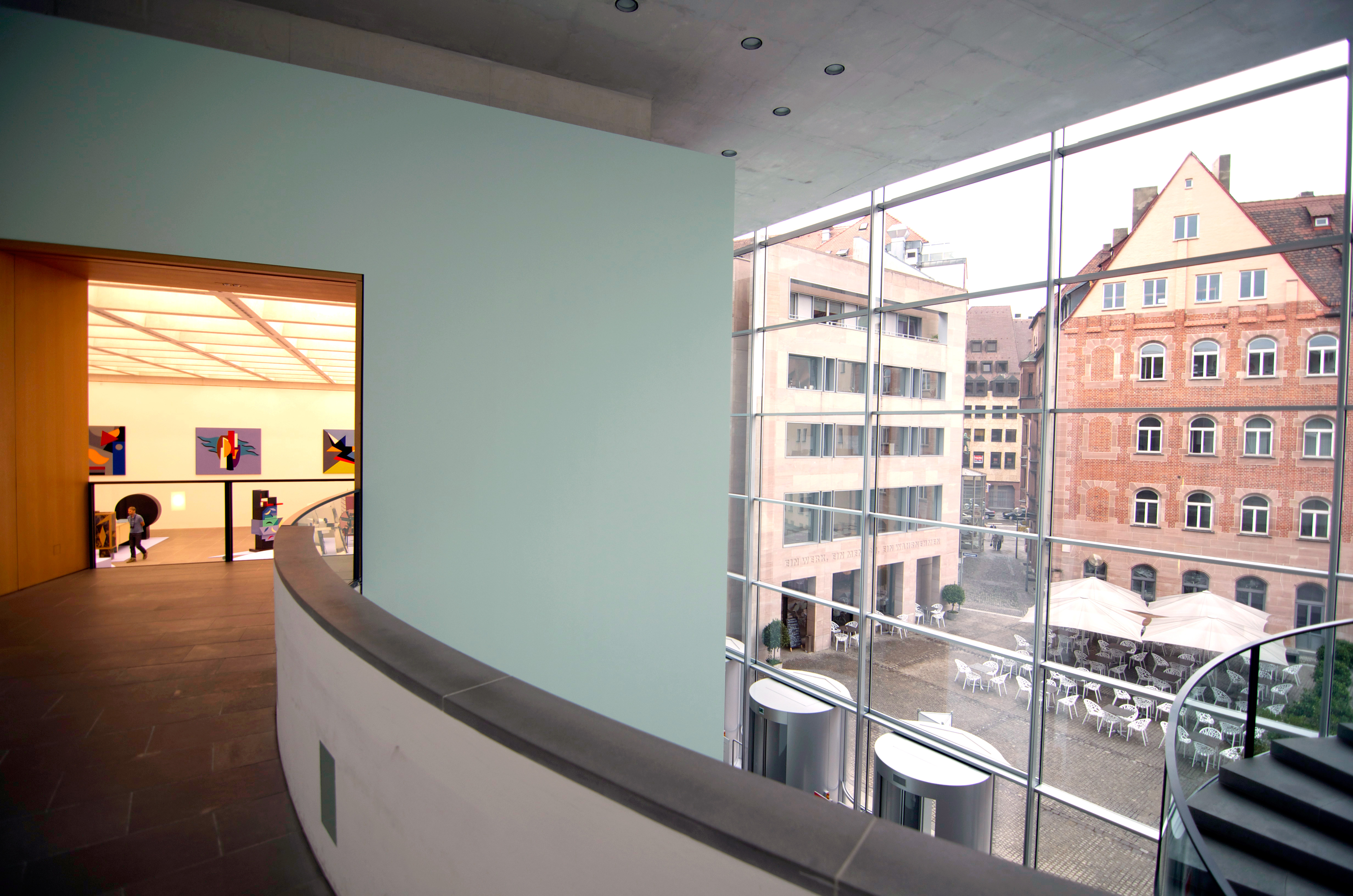 Neues Museum Nürnberg, 2. OG: Blick auf die Ausstellungsräume und den Klarissenplatz